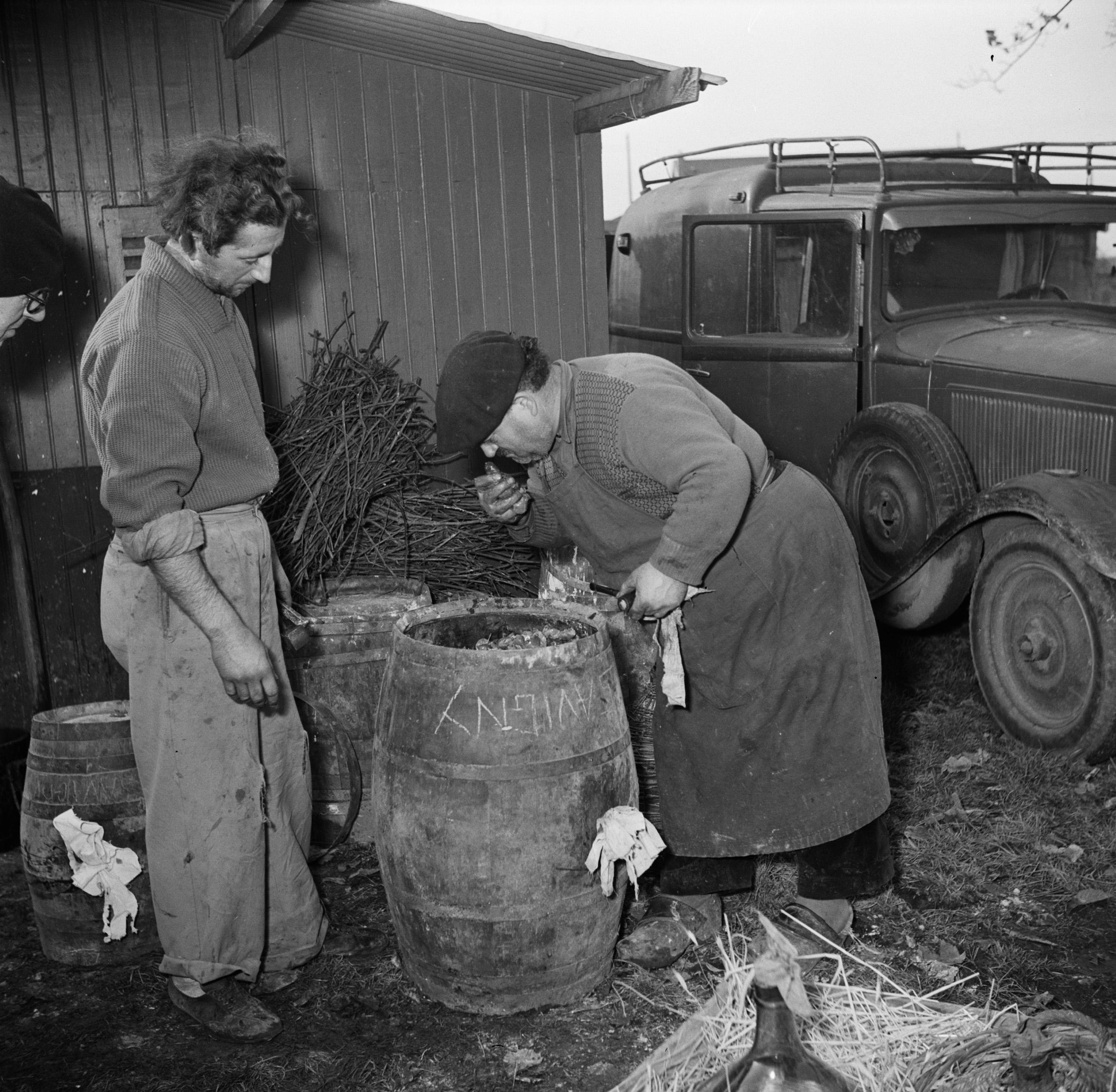 Collectie / Archief : Fotocollectie Van de Poll Reportage / Serie : Destilleerketel in de open lucht Beschrijving : Mannen met een vat met kolen Datum : 1950 Locatie : Frankrijk, Parijs Trefwoorden : auto's, klompen, mannen, steenkool Fotograaf : Poll, Willem van de Auteursrechthebbende : Nationaal Archief Materiaalsoort : Negatief (zwart/wit) Nummer archiefinventaris : bekijk toegang 2.24.14.02 Bestanddeelnummer : 252-9481